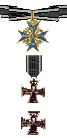 Orde van Goering